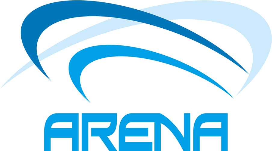 Logotipo da Arena do Grâmio